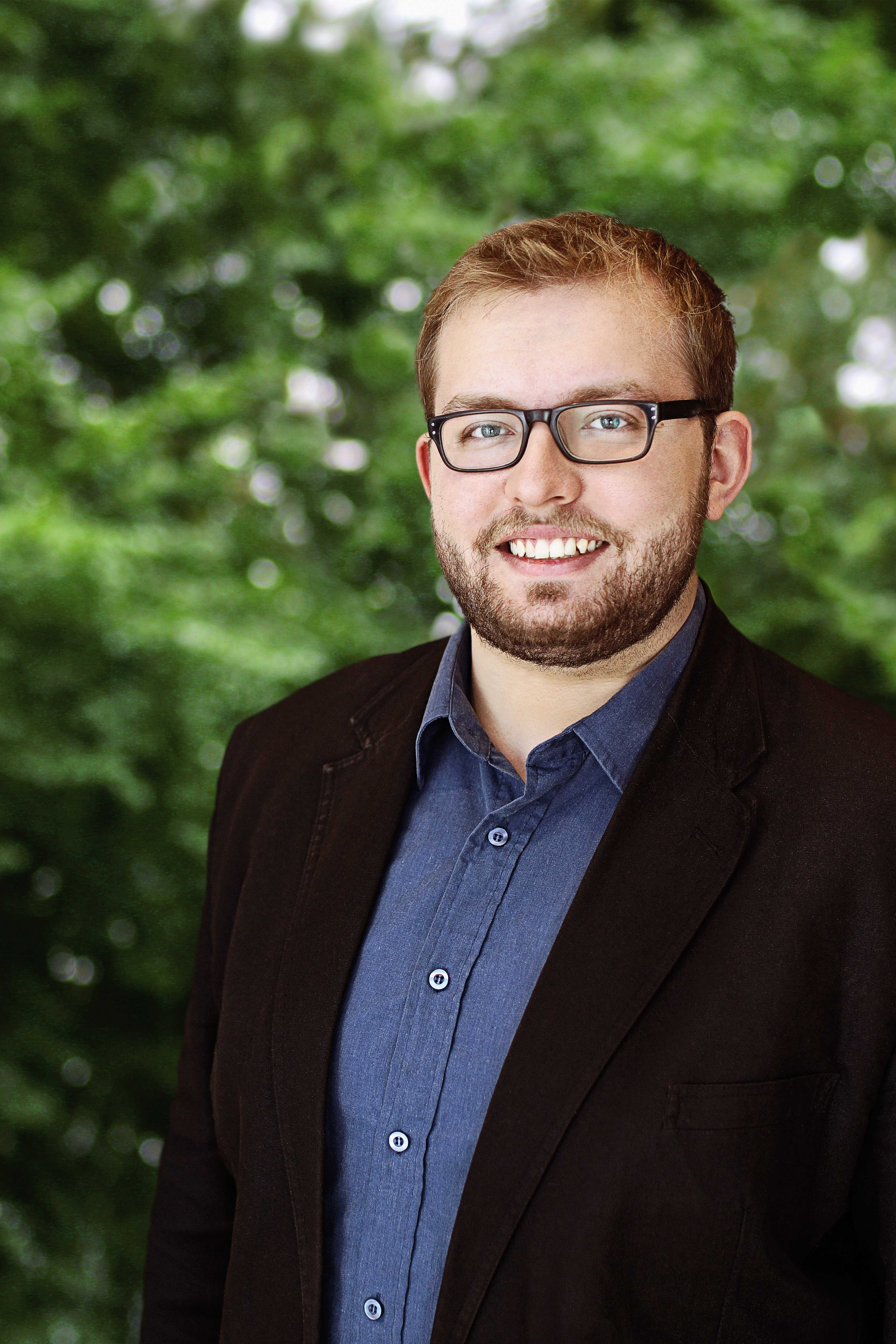 Abgeordneter im Landtag von Baden-Württembeg (GRÜNE)